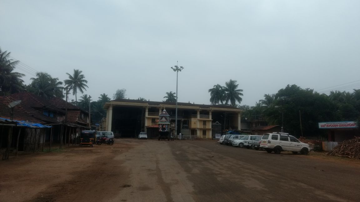 ಕನ್ನಡ: ರಥಬೀದಿ, ಮಂಜುಗುಣಿ ದೇವಸ್ಥಾನ